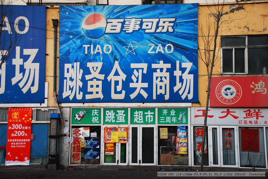 跳蚤仓买商场